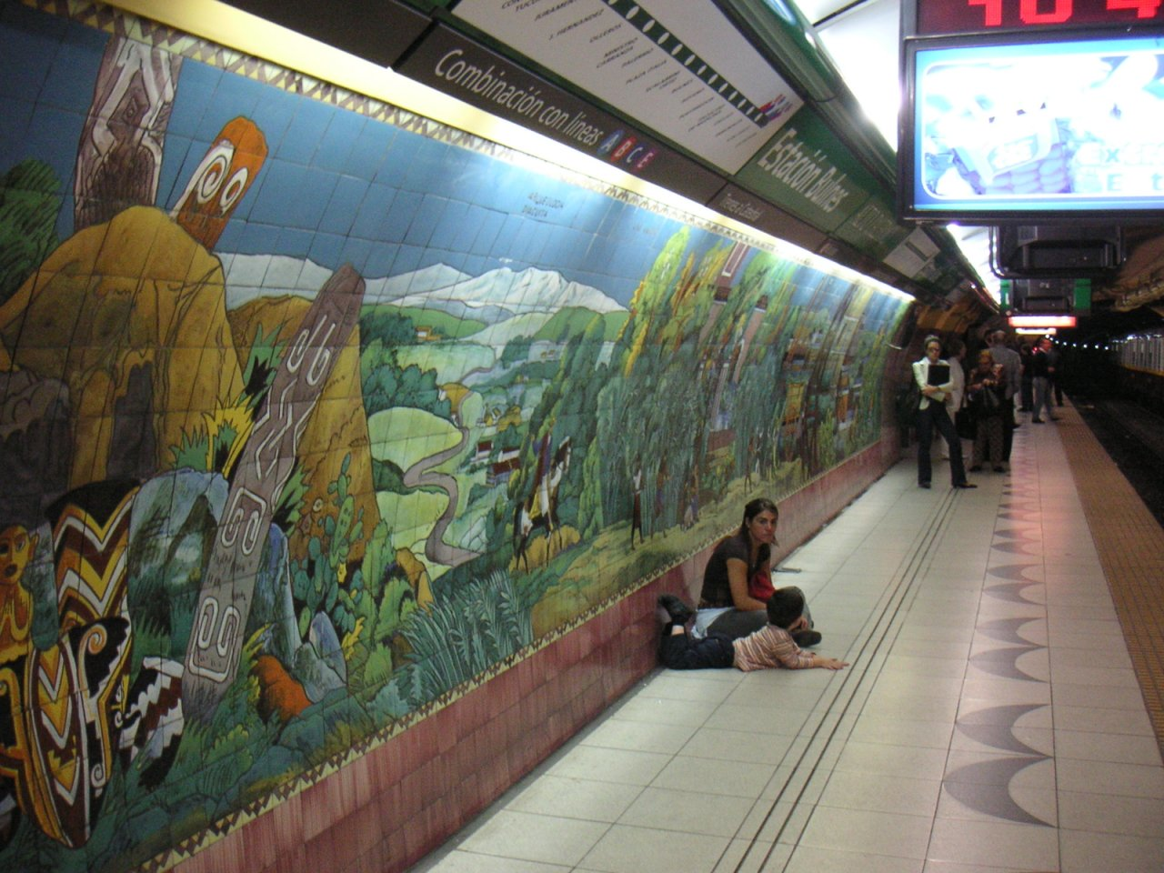 Mural en la estación Bulnes de la línea D del subterráneo porteño